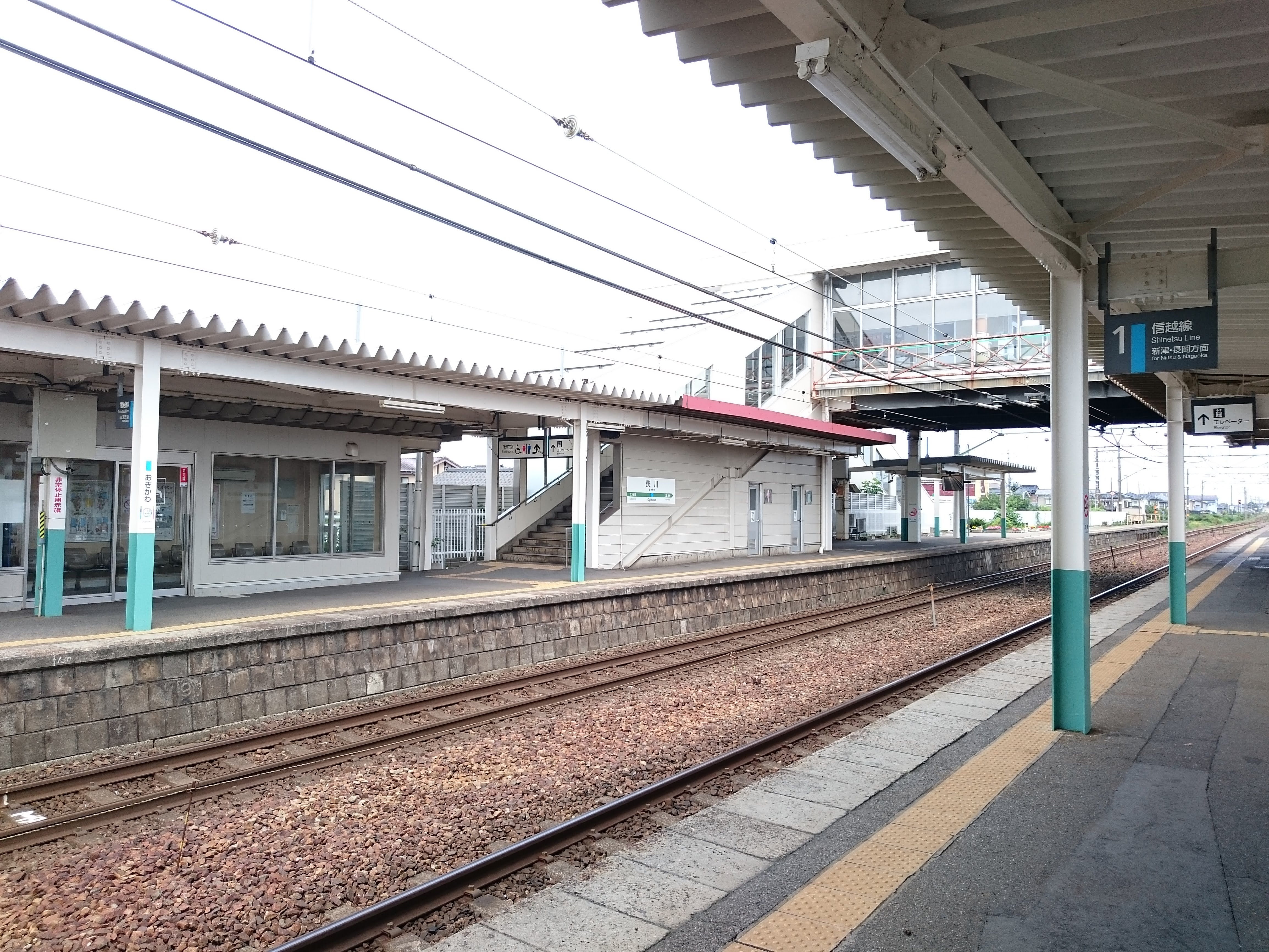 さつき野駅のホーム